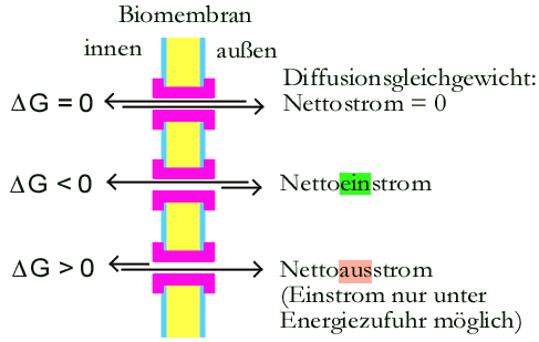 Nettostrom bei Diffusion durch Biomembran